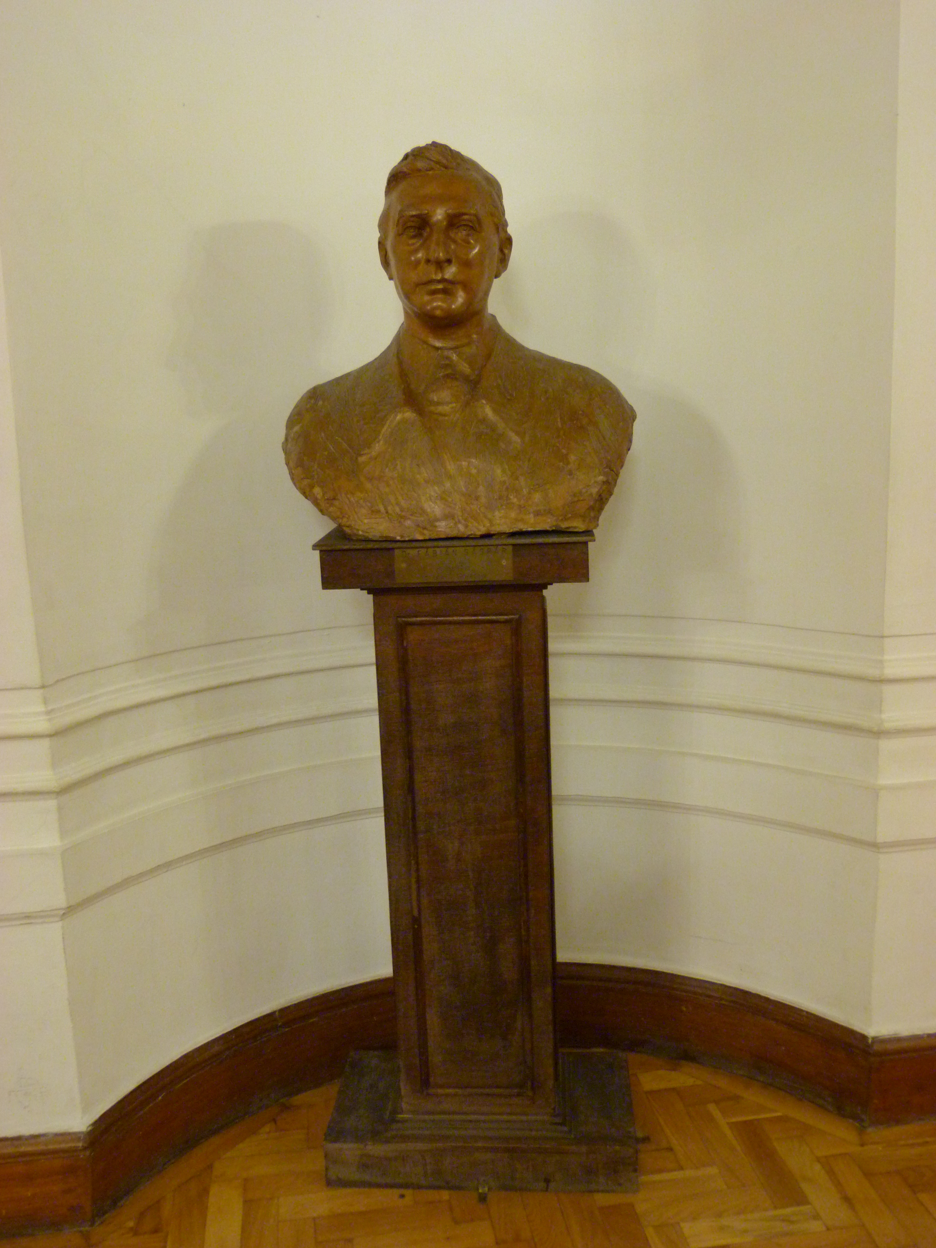 Dr. Fábián Gáspár mellszobra (1885 –1953). A felvétel Budapesten készült a Kaffka Margit Gimnáziumban 2013. December 14 –én. Mellszobor a Gimnázium dísztermében. Műépítész, a Kaffka Margit Gimnázium tervezője. Középület-építő tevékenységének legjelentősebb alkotása, a Szent Margit Leánygimnázium (1947–96 között Kaffka Margit Gimnázium), a budapesti Villányi úton épült (1929–1930). Az alagsor felett négy szintű magas épület a két szélén előrelépő tömbökkel erősen tagolt. A kompozíciónak további hangsúlyt ad az öttengelyes bejárati rizalit, melyet elszélesedő oromzat zár le. Mögötte jelenik meg az épület középpontját koronázó, oszlopos, kör alapú és kupolával fedett tetőfelépítmény. A díszterem a neobarokk téralkotás jellemző példája: a térarányok a középület tartószerkezeti rendszeréhez igazodnak, a fal- és mennyezetfelületet borító díszítések, a boltozatok és az ablakzáradékok a történeti kort idézik. Források: hu.wiki ©© Derzsi Elekes Andor, Budapest, 2013, You are authorised to use these photos and vids under Creative Commons – even for commercial, for profit purposes. Photos must be attributed to Derzsi Elekes Andor. All of the photos and vids in the Metapolisz DVD line are under Creative Commons and can be used even for commercial – for profit – purposes. Recommended Citation Derzsi Elekes Andor: Metapolisz DVD line